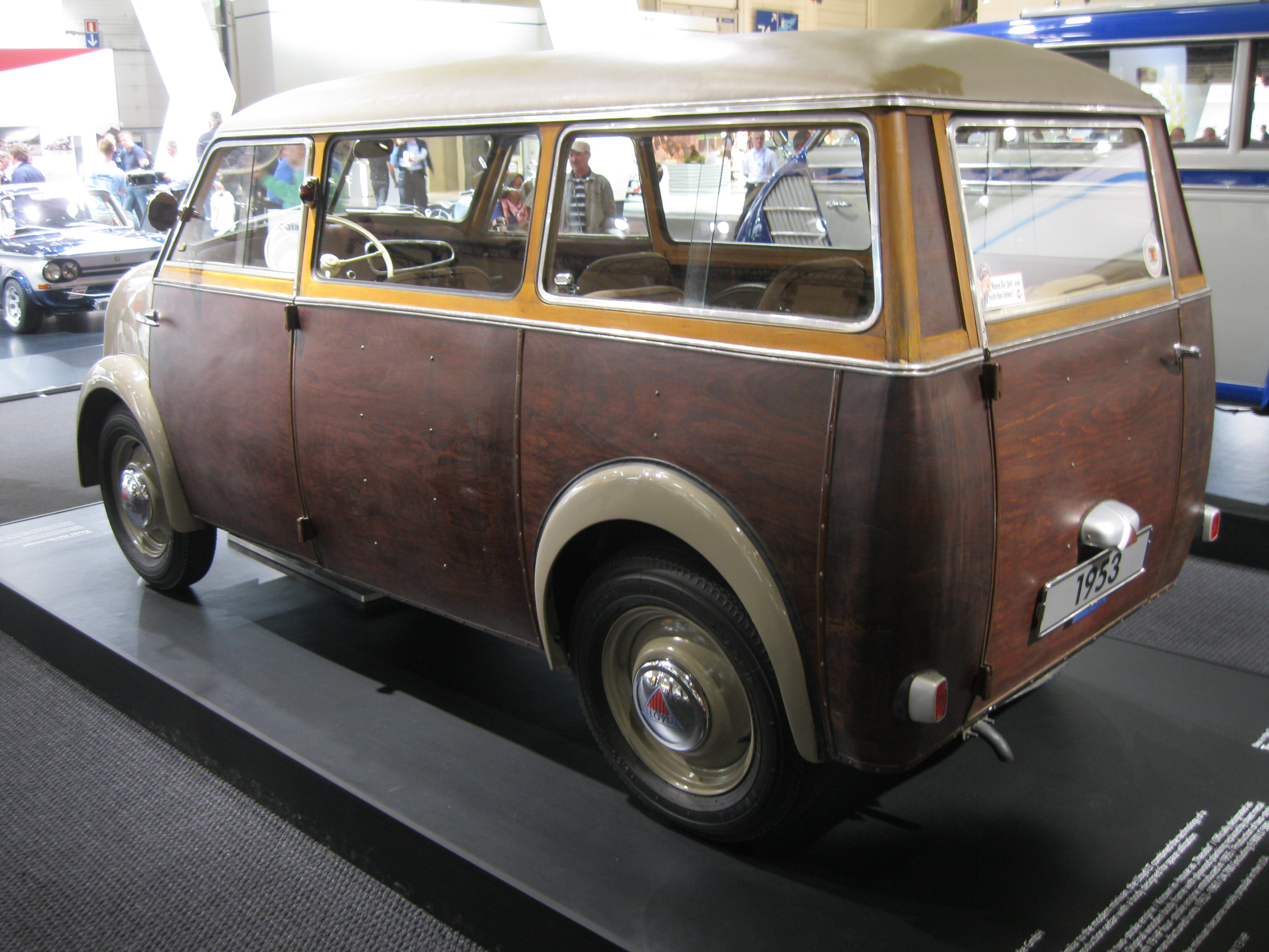 Techno Classica Essen 2012